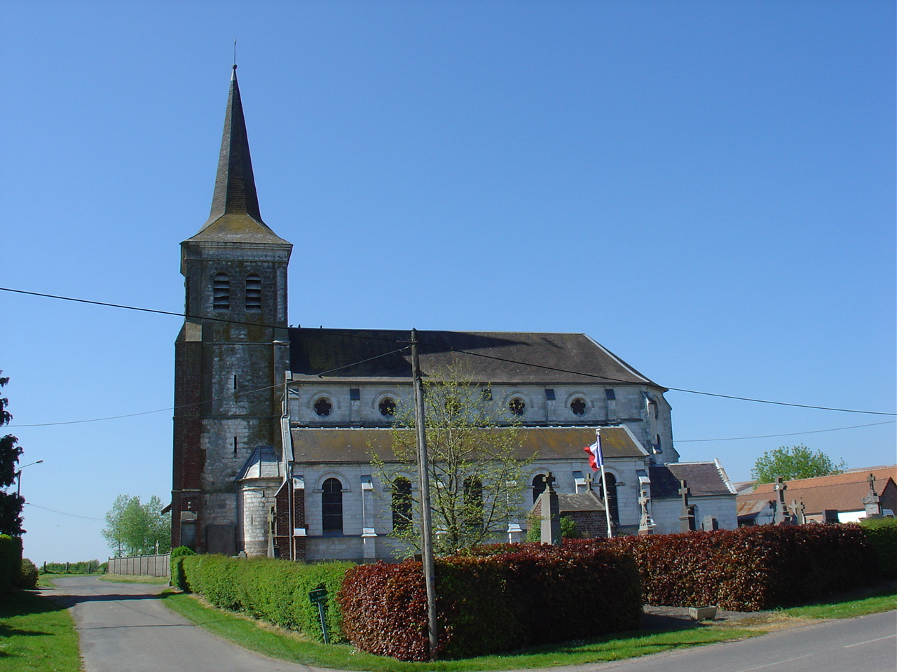 Église de Maisnil